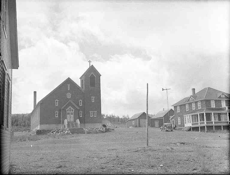 Église et presbytère de Saint-Thomas-de-Cherbourg dans le comté de Matane